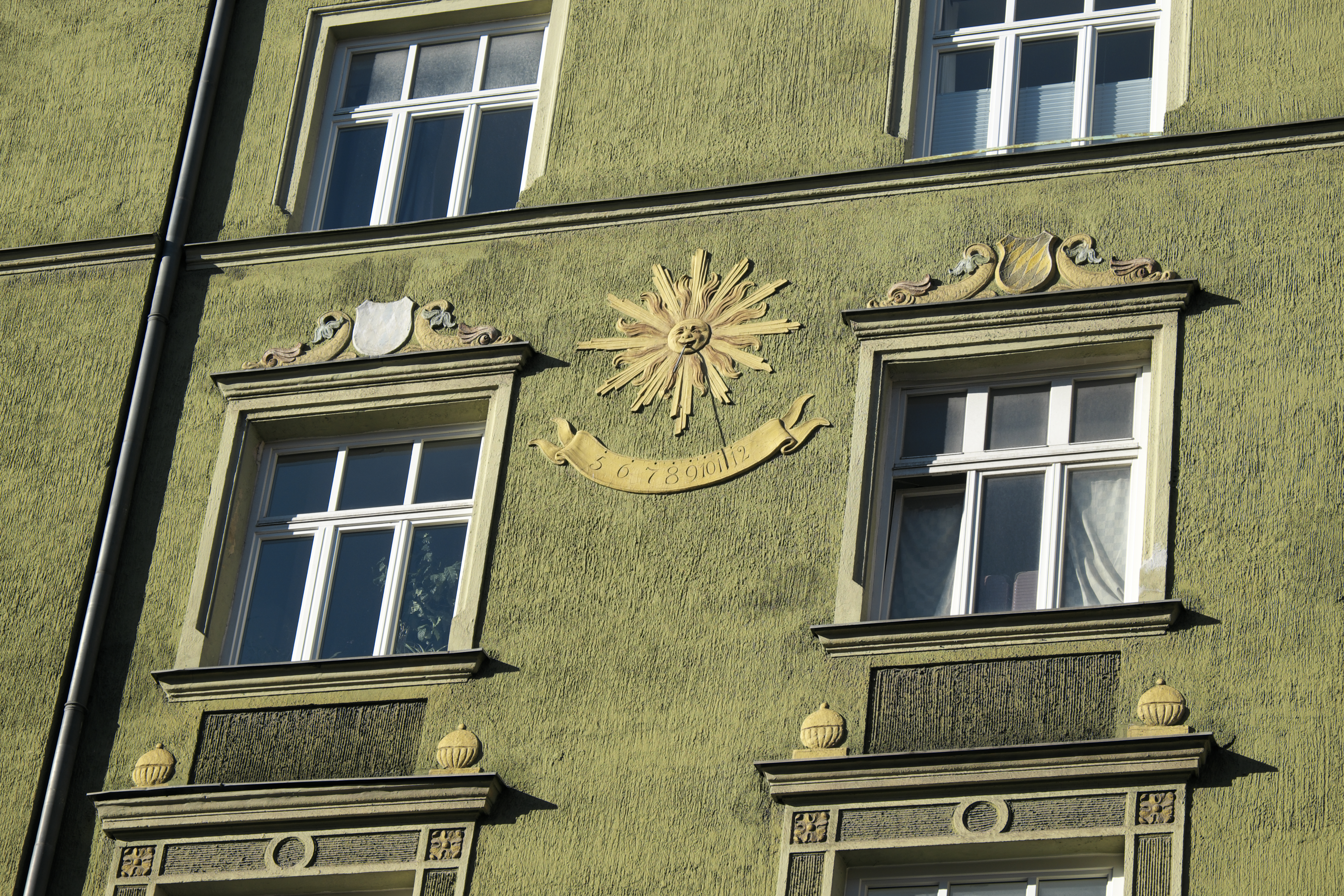 Mietshaus in der Landsberger Straße 129 im Stadtbezirk Schwanthalerhöhe in München (Bayern/Deutschland)